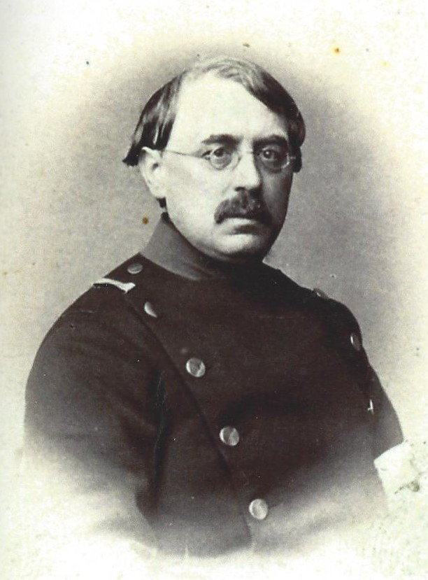 Porträtfotografie von Franz Geerz